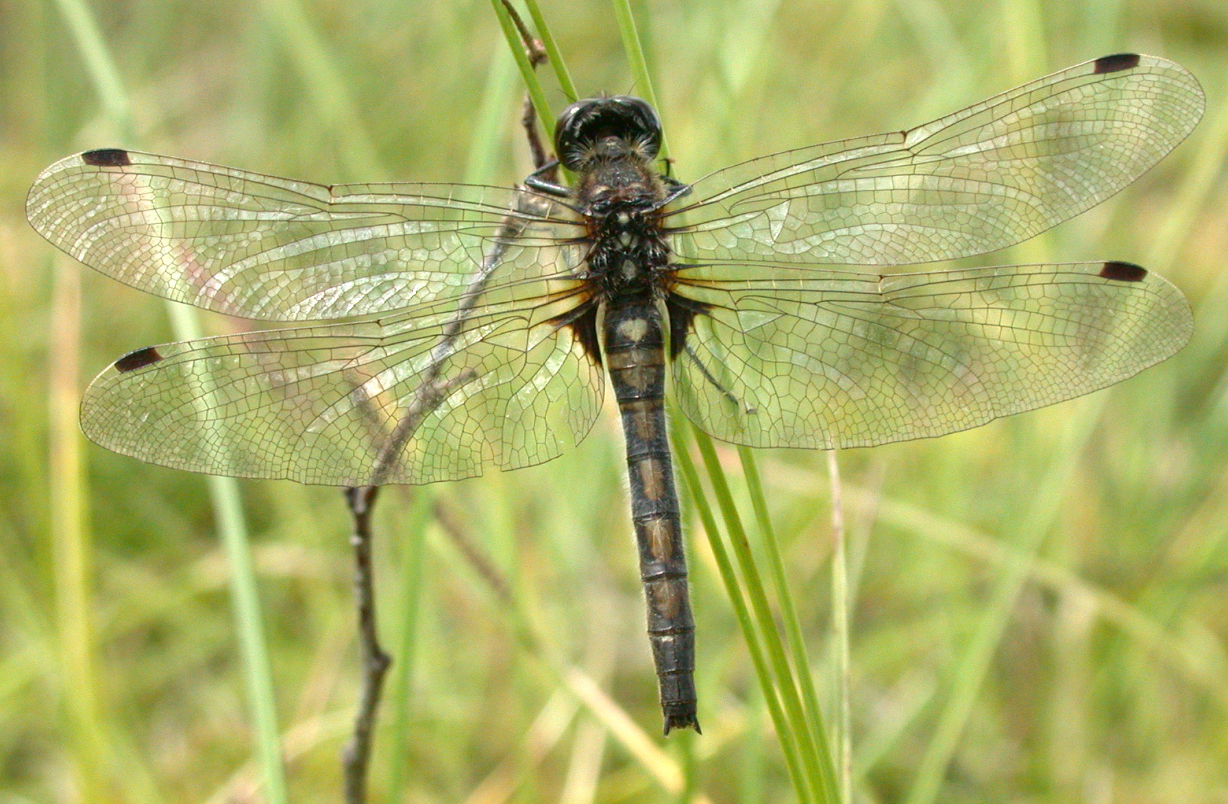 Leucorrhinia rubicunda female